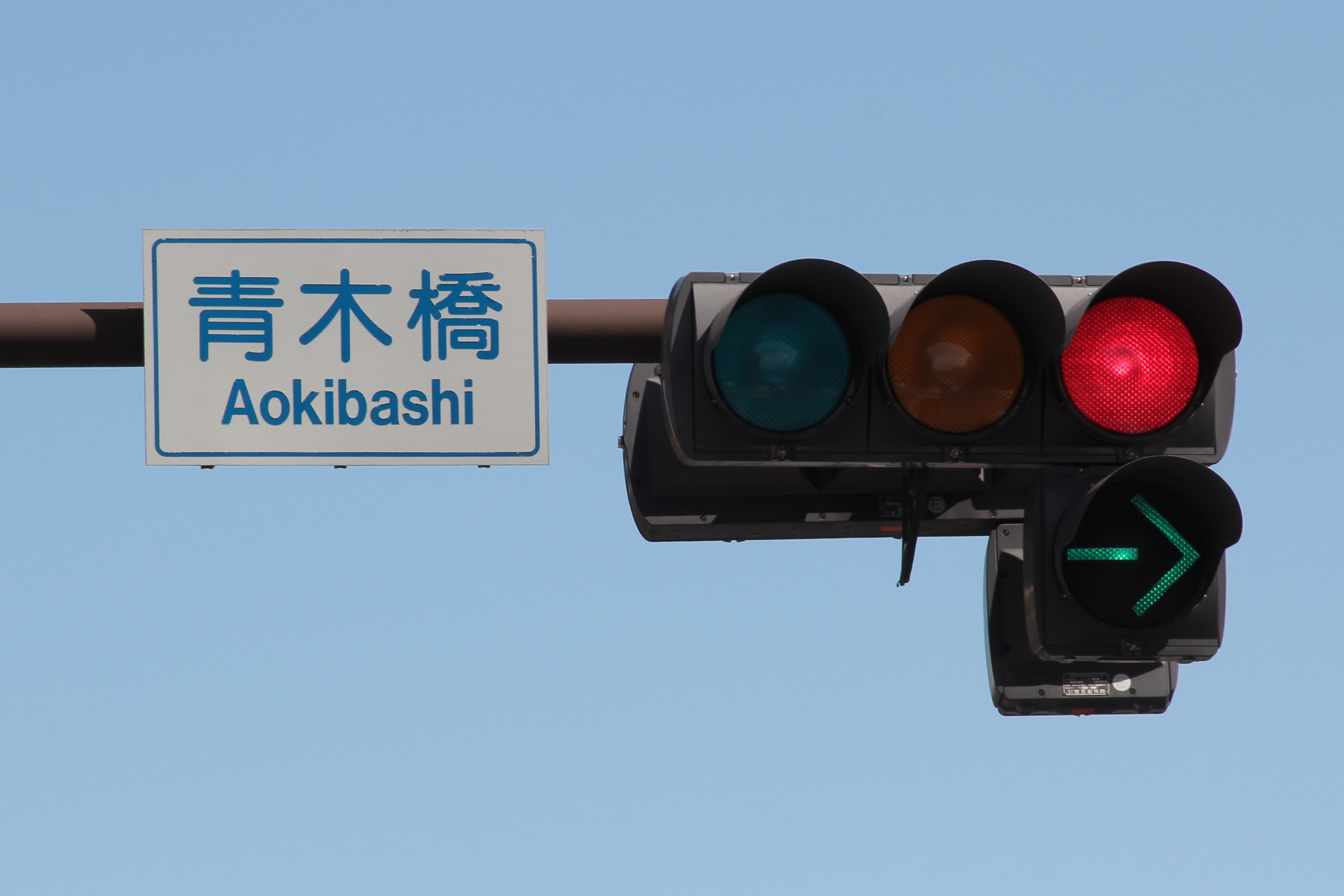 青木橋交差点 矢印信号 - 矢印表示状態